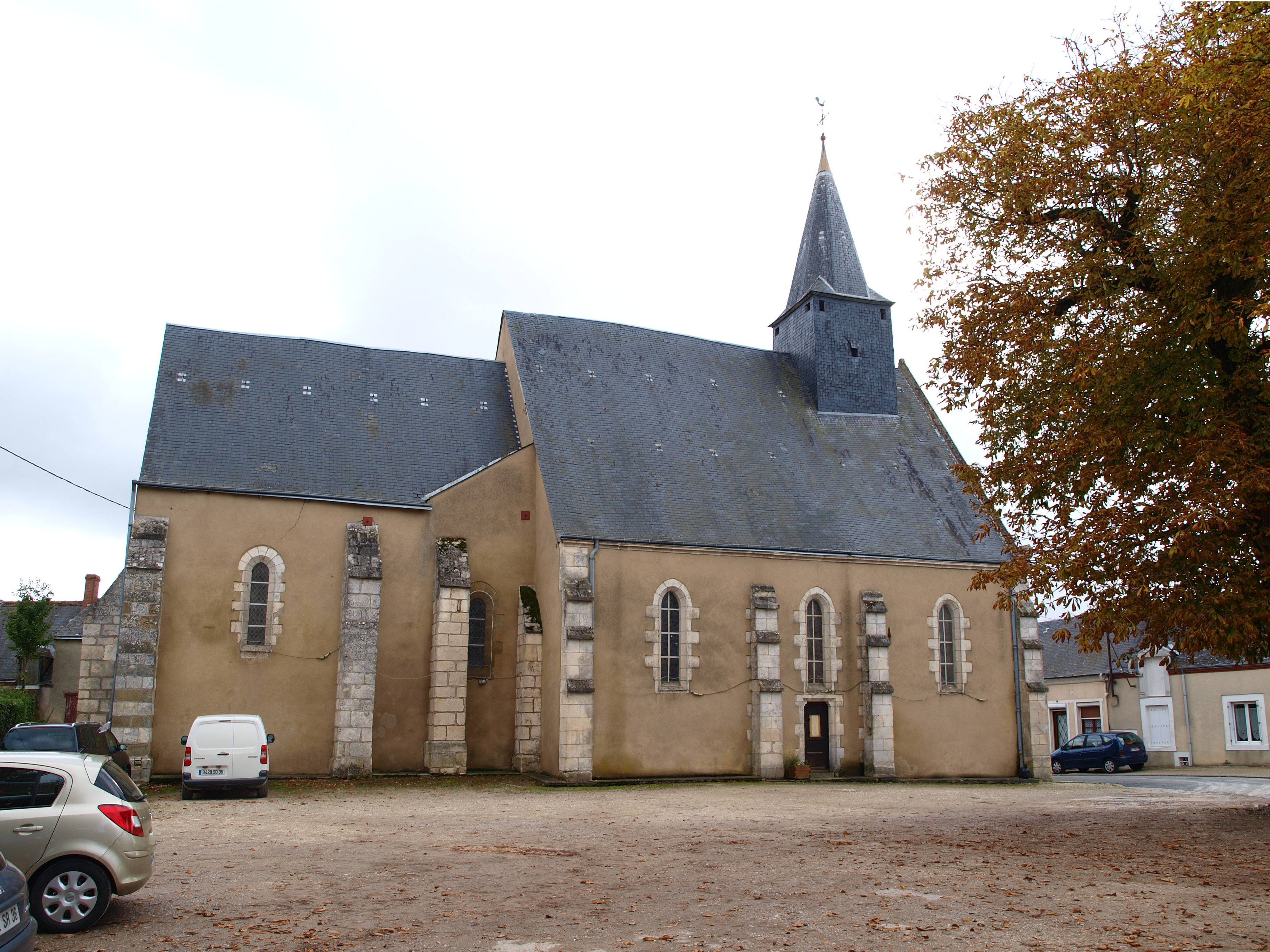 Brion (Indre, France) ; église